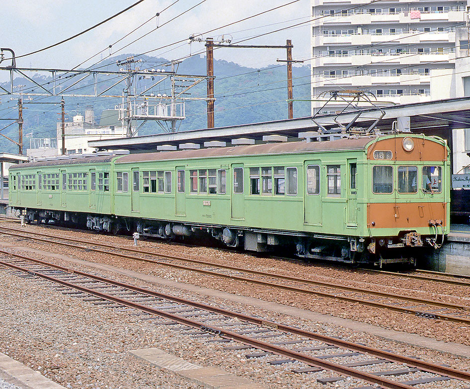 国鉄クモハ73001＋クハ79326